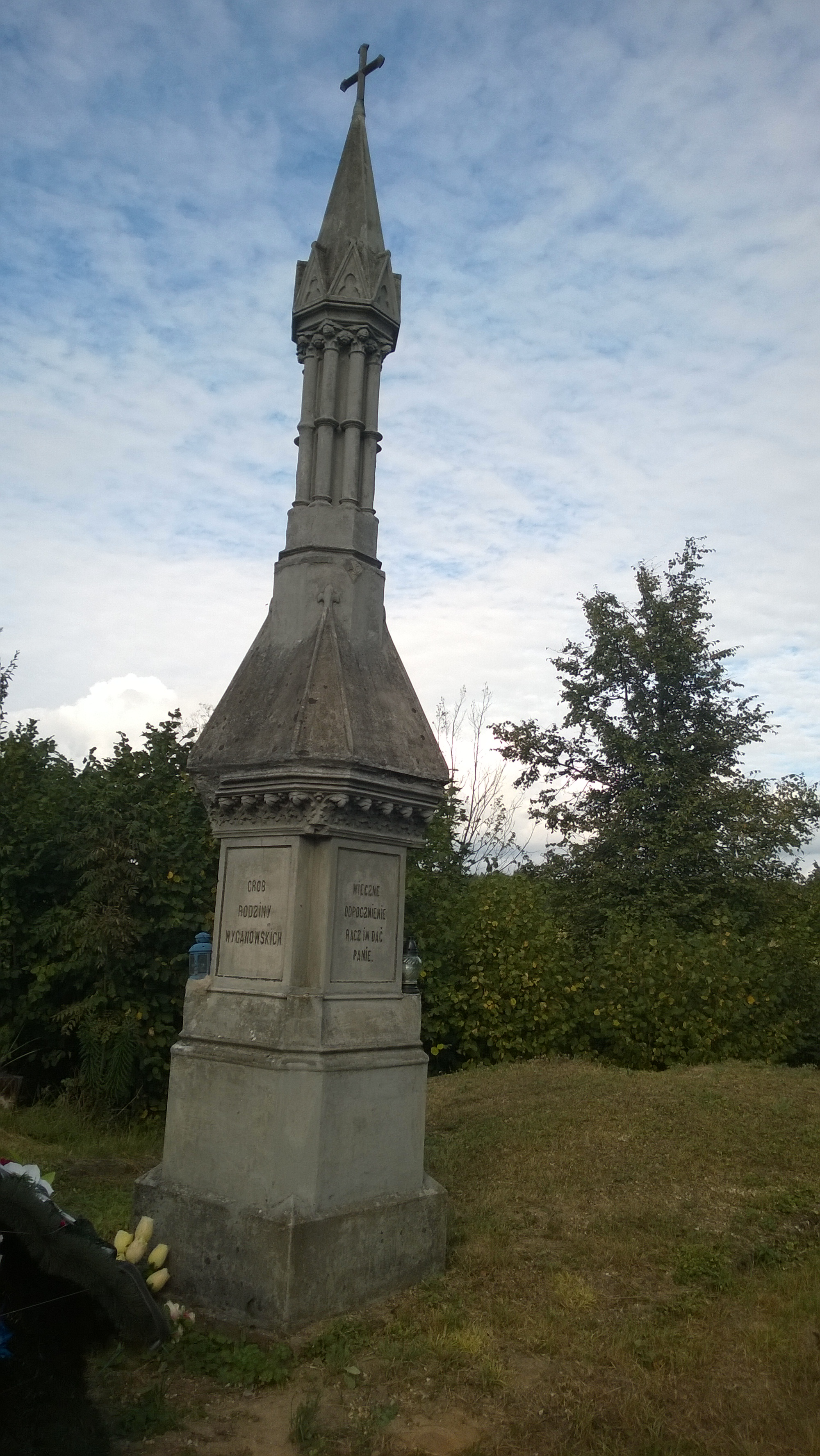 Кашубінцы, Belarus